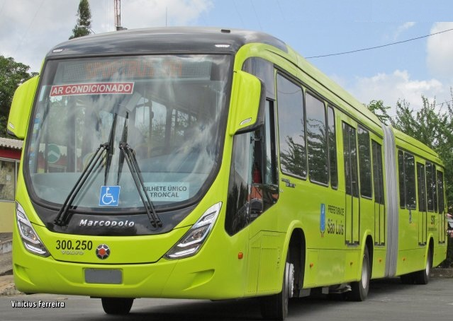 Carro nº 300-250 da Viper Transportes, empresa que atua no Sistema Integrado de Transporte de São Luís, MA - Brasil